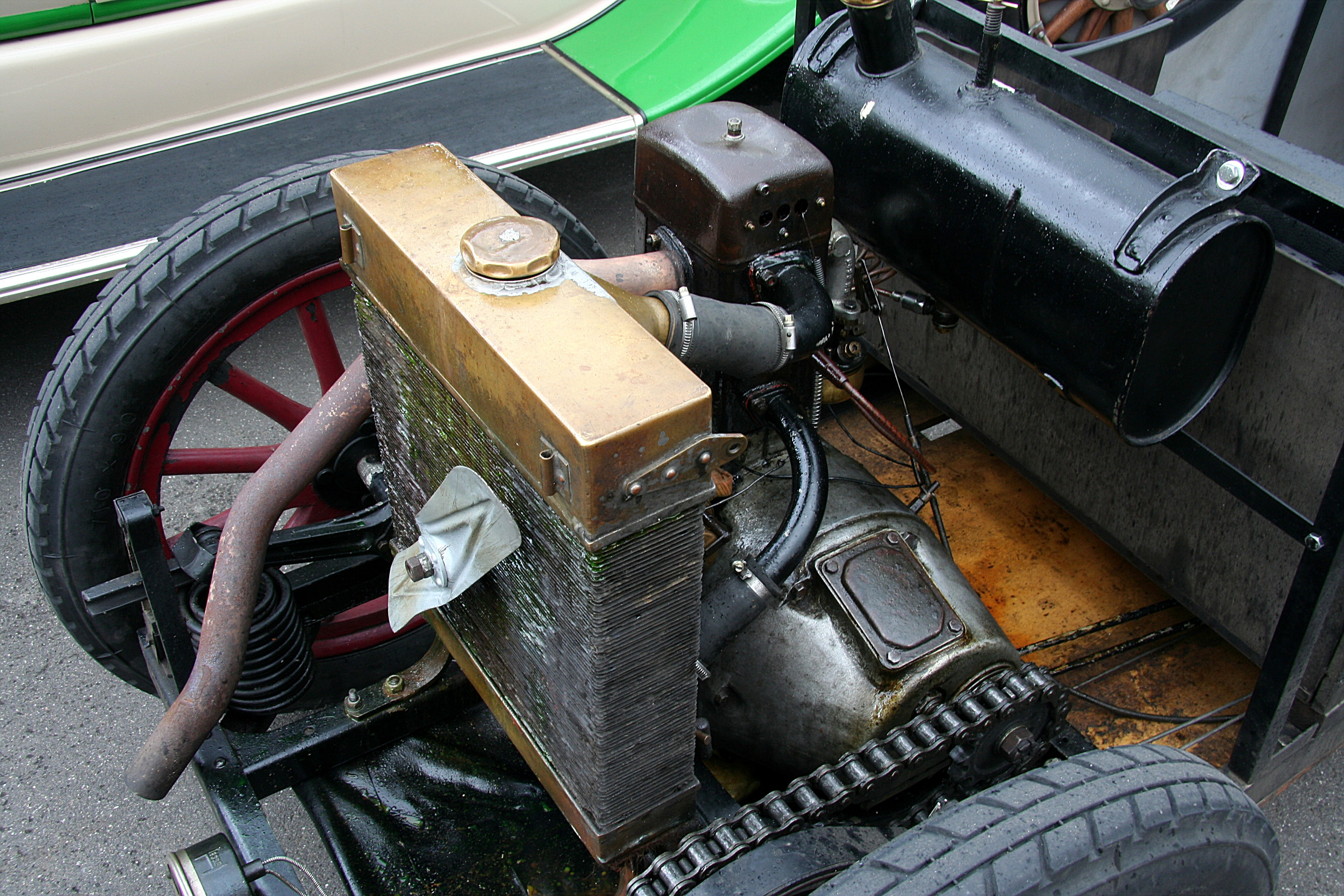 Hanomag Kommissbrot (Rennausführung) beim Oldtimer Festival des DAMC 05 im alten Fahrerlager des Nürburgrings – Antrieb und Radaufhängung